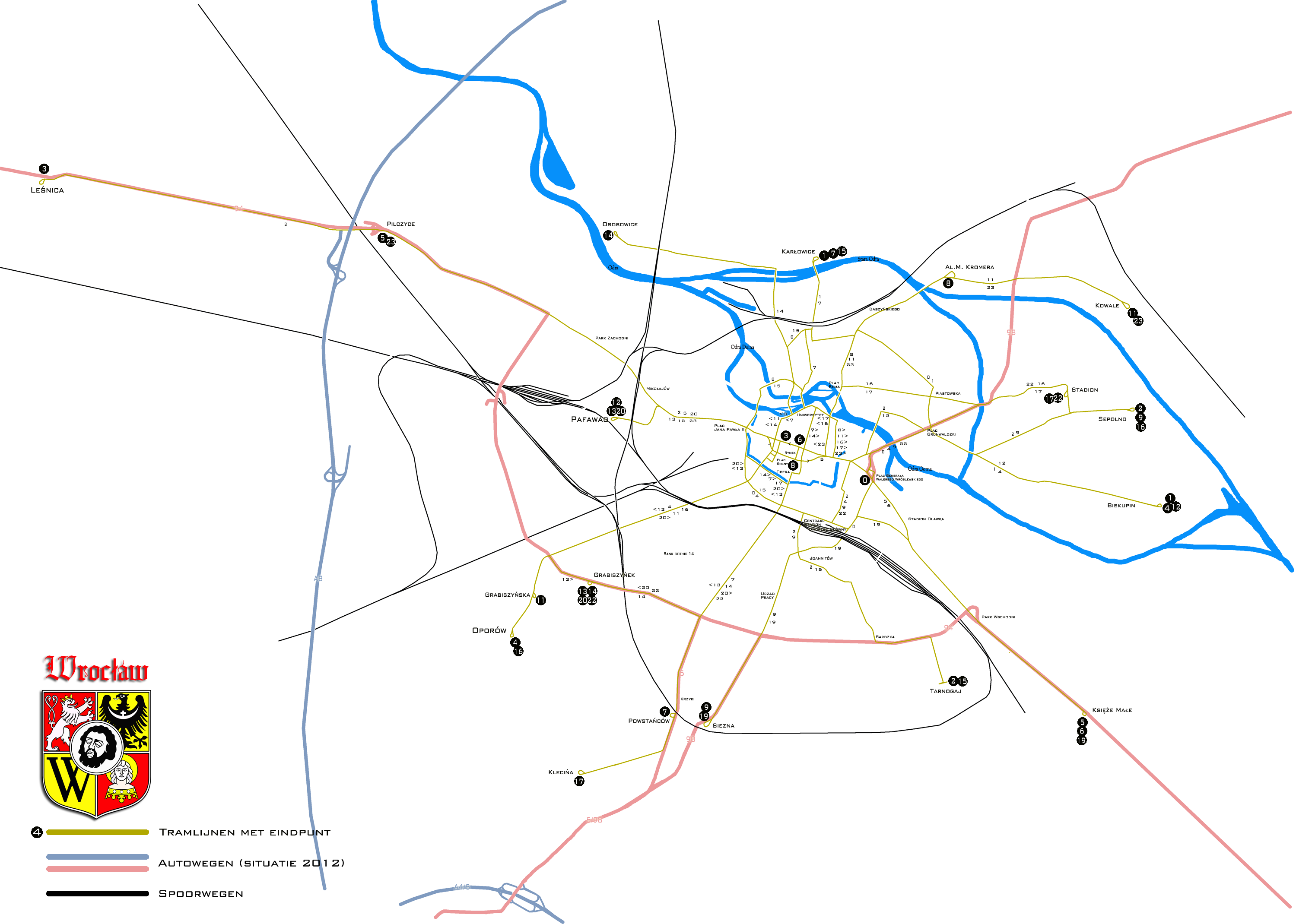 Tramnet van Wroclaw in 1974